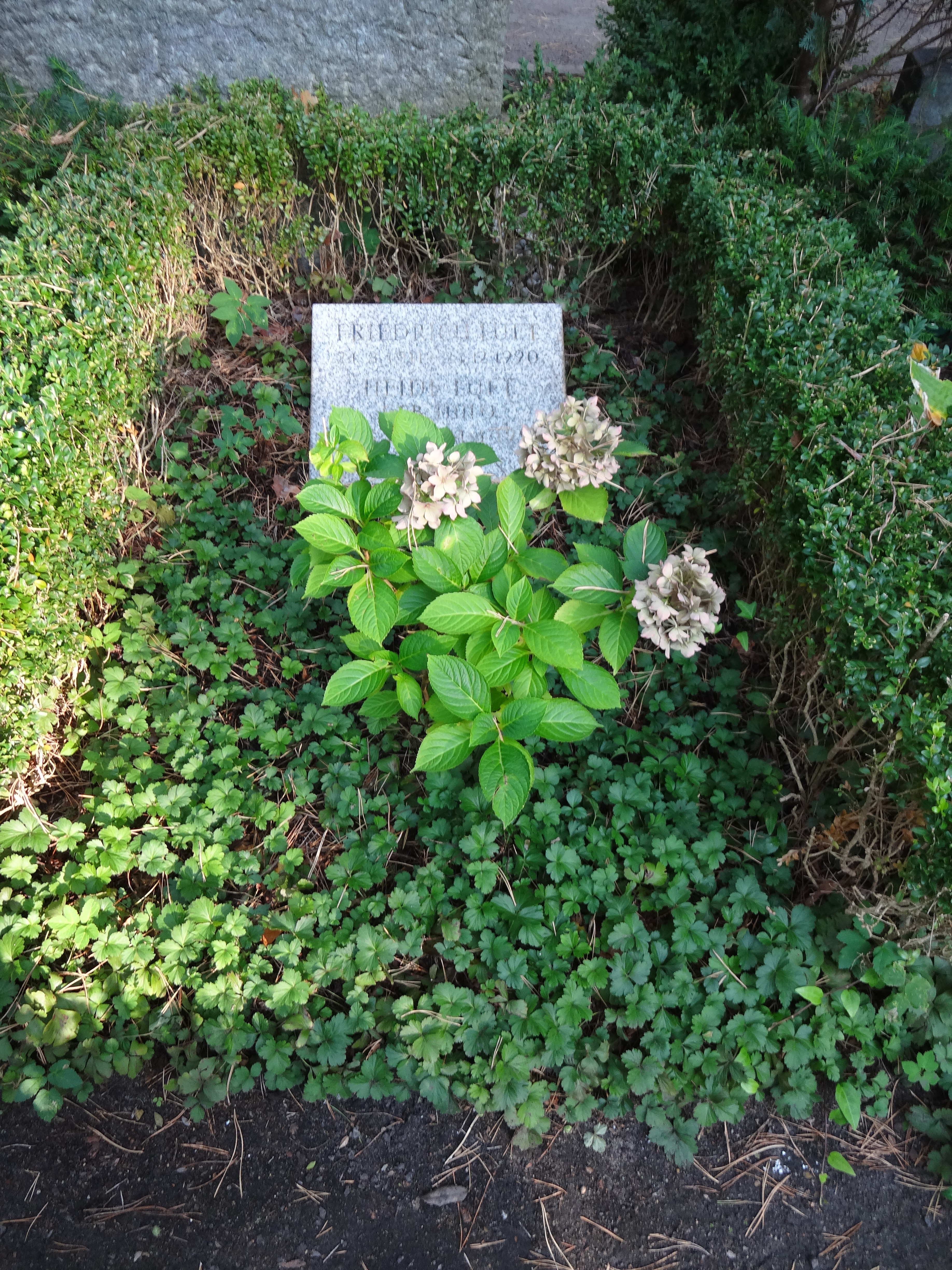 Ehrengrab von Luft, Friedrich auf dem Waldfriedhof Dahlem, der Friedhof ist als Gartendenkmal der Stadt Berlin (Nr. 09045949)This is a photograph of an architectural monument.